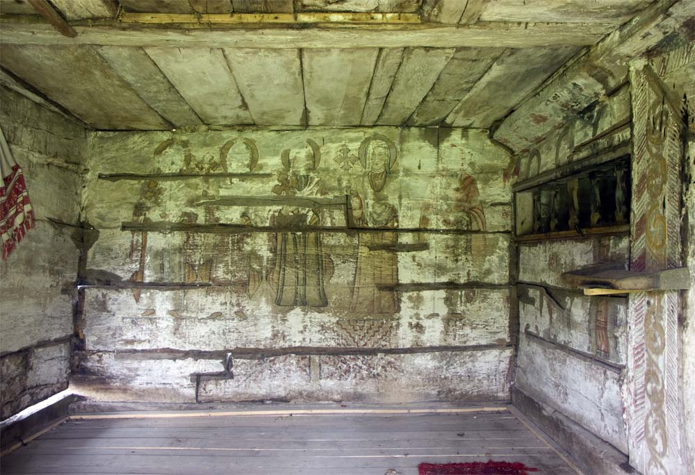 Biserica de lemn din Zimbor, pictură ameninţată de ape în interiorul pronaosului.